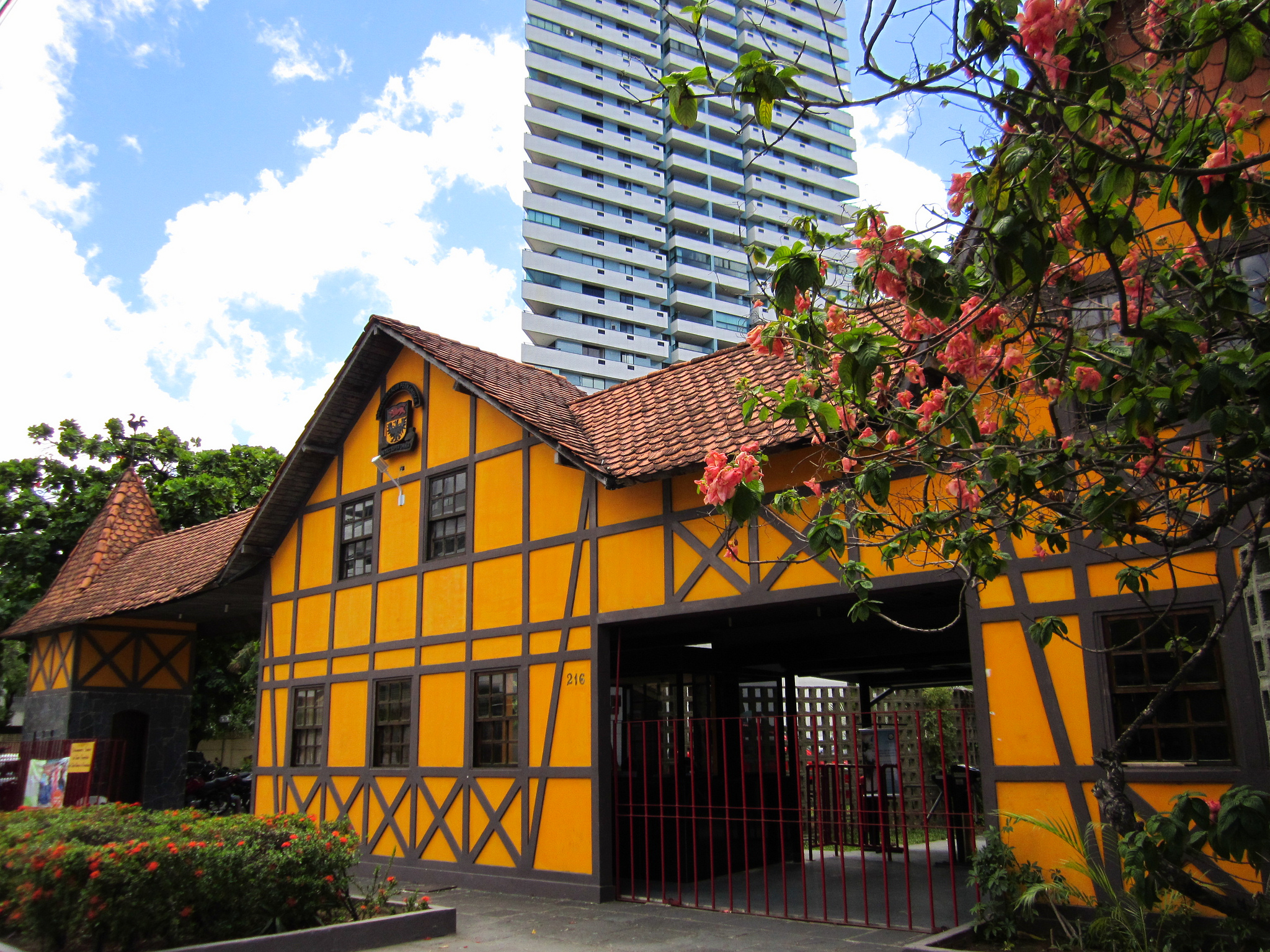 Deutscher Klub Pernambuco (Clube Alemão de Pernambuco) - Bairro do Parnamirim - Recife, Pernambuco, Brasil